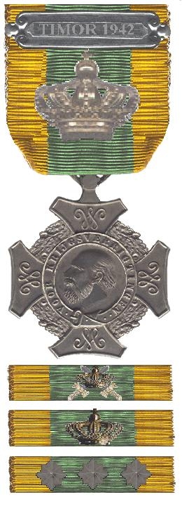 Het Erekruis voor Belangrijke Krijgsbedrijven met de batons